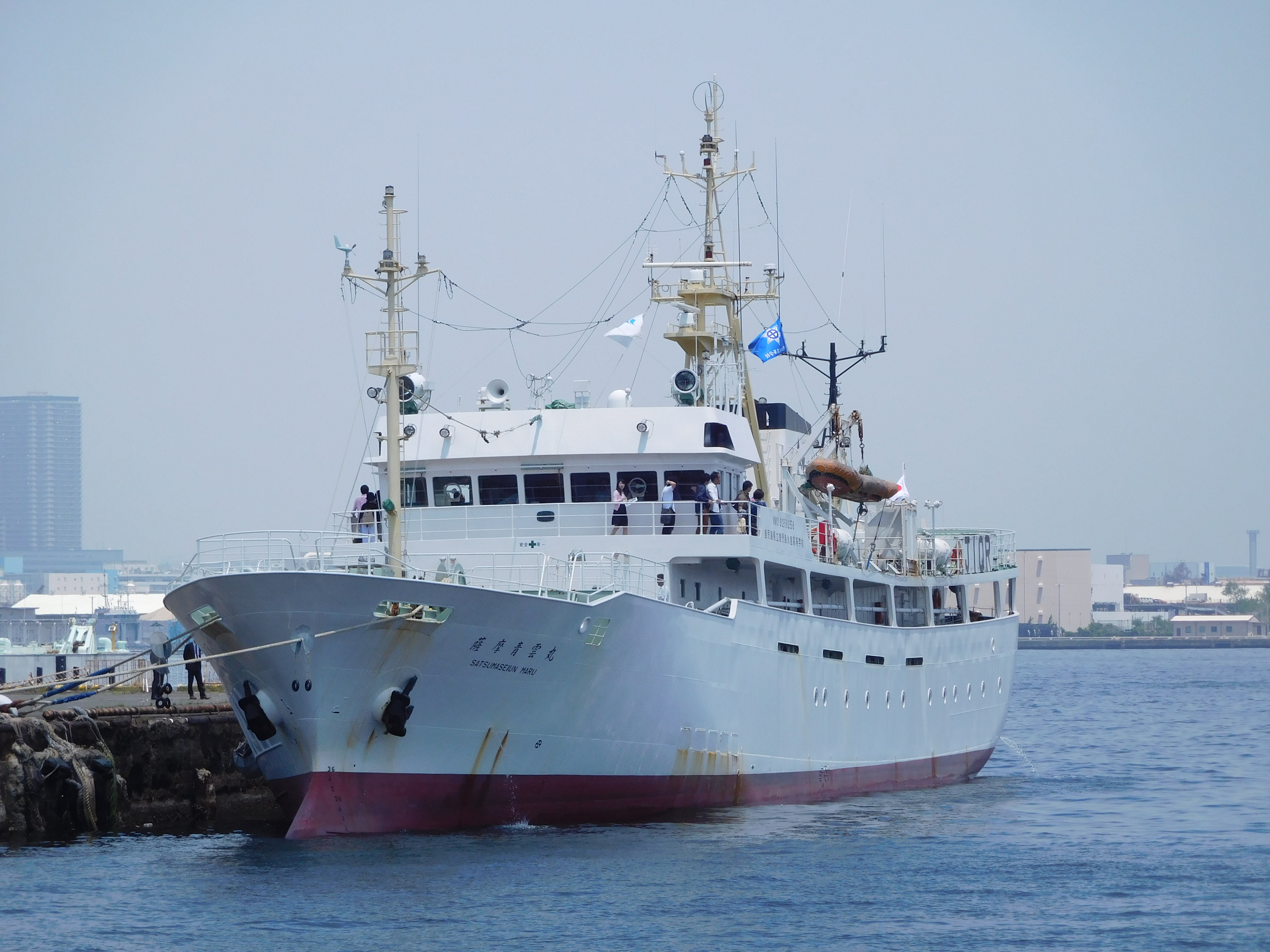 鹿児島県立鹿児島水産高等学校の漁業練習船 薩摩青雲丸